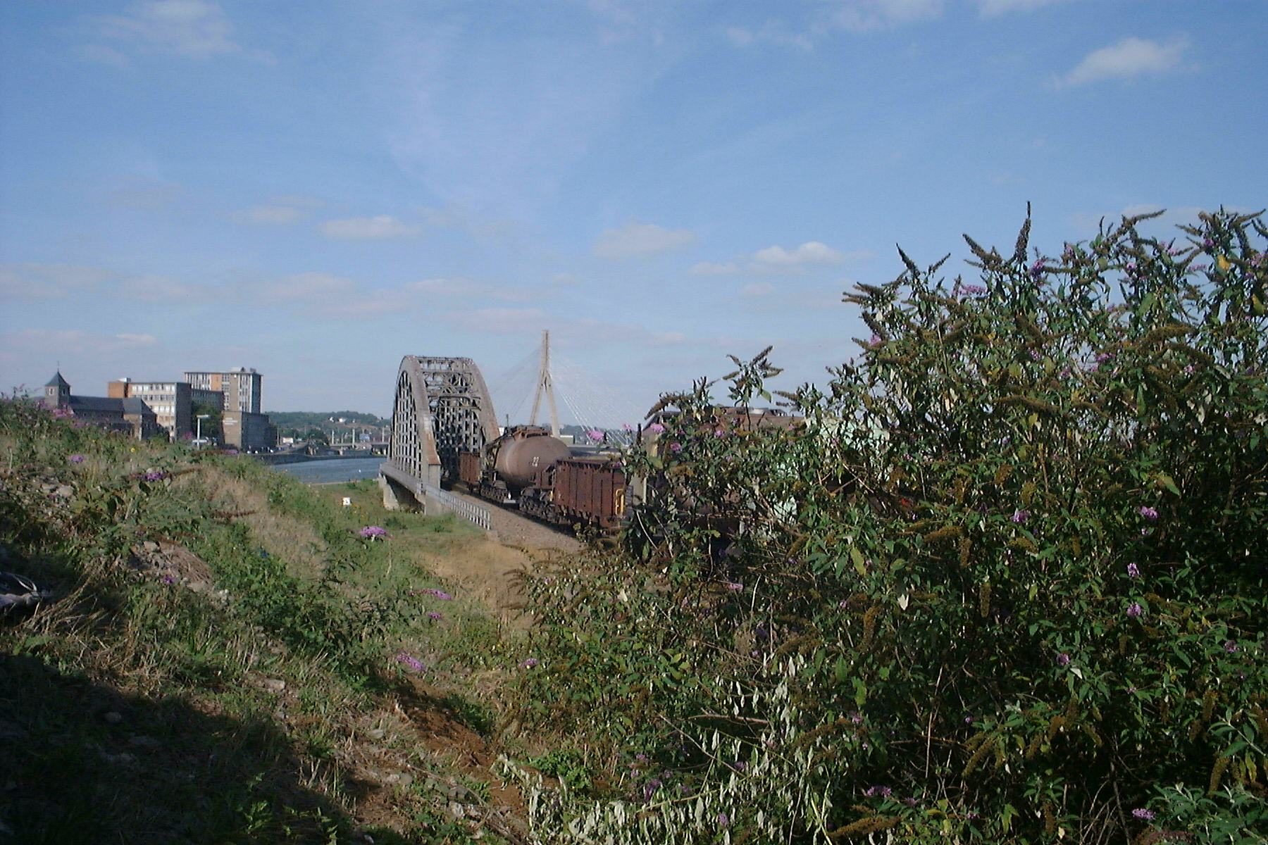 Train on vierendeel bridge